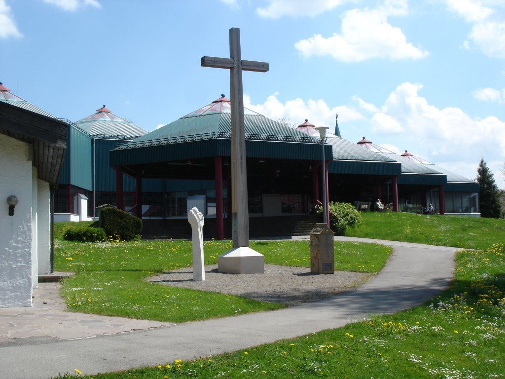 Herz-Jesu- und Mariä-Sühne-Kirche („Maria vom Sieg“) Opfenbach-Wigratzbad/Allgäu. Architekt: Gottfried Böhm